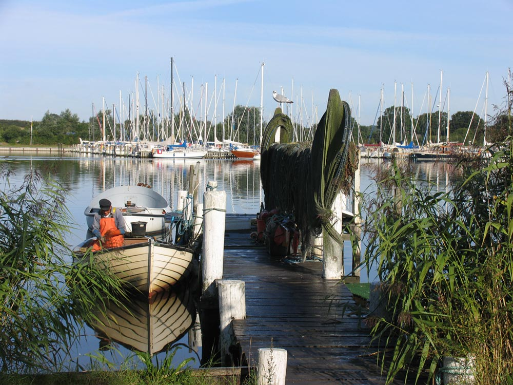 Arnis 2005 - der 90jährige Heinrich Wiese fischt noch heuteDansk: Arnæs Nor